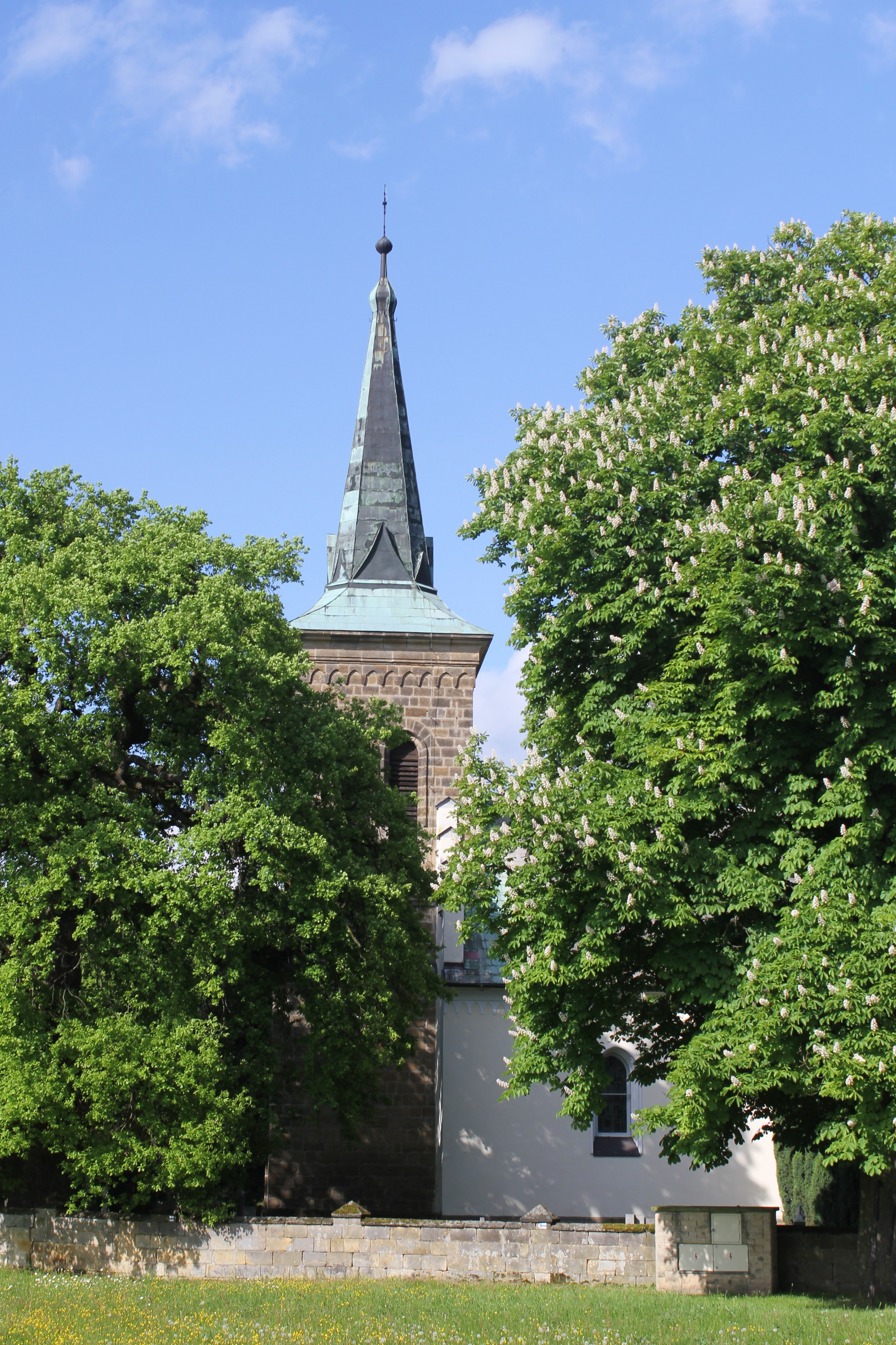 Kostel sv. Jiří (Karlovice), Přáslavice, Karlovice